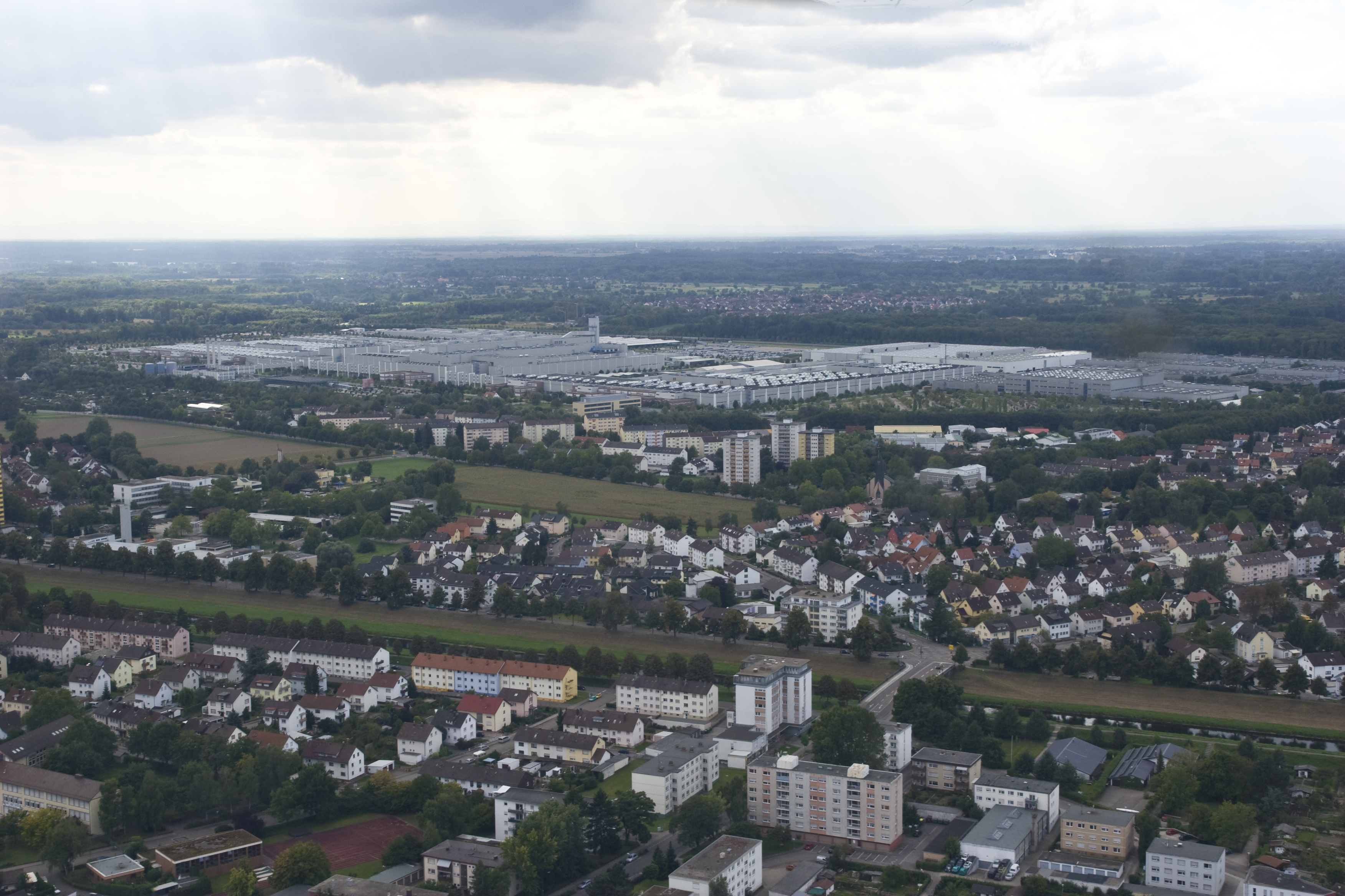 Das Mercedes-Benz Werk in Rastatt, ein Produktionswerk der A- und B-Klasse des Daimler Konzerns.